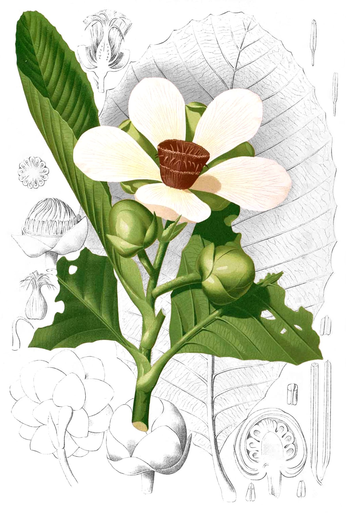 Dillenia reifferscheidia Plate from book